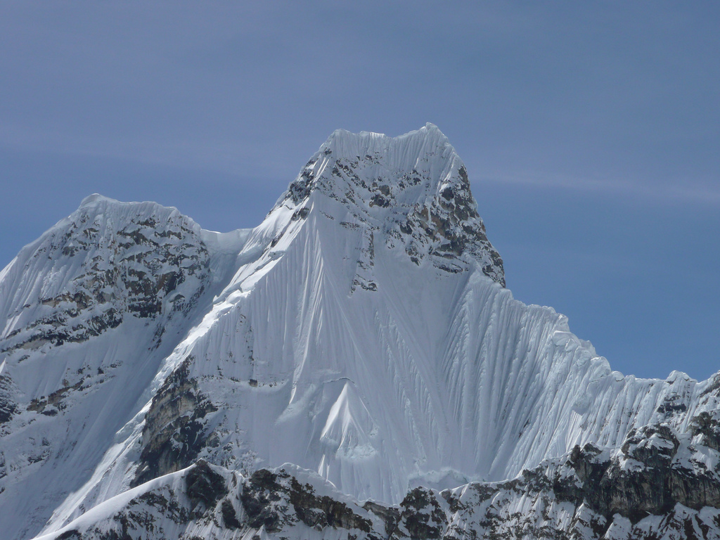 Foto fatta il 26 giugno 2006 dal ghiacciaio sottostante il Jirishanca, Yerupajà e Rasac.